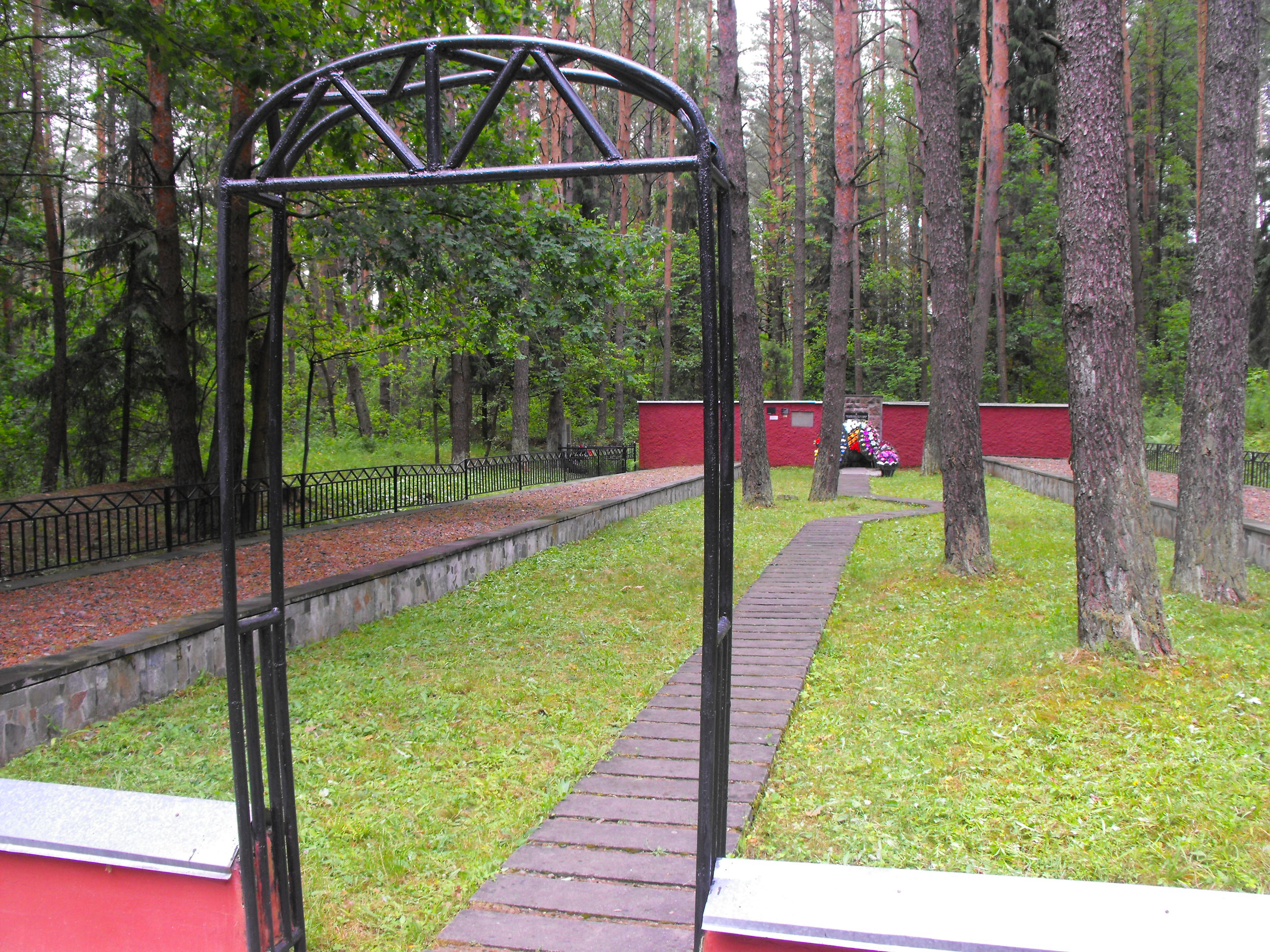 Мемориальный комплекс на месте убийства 2 524 евреев Ивье нацистами и полицаями 2 августа 1941 и 12 мая 1942 года. Находится рядом с Ивье, у деревни Стоневичи (урочище Стоневичи), у дороги H-6147.